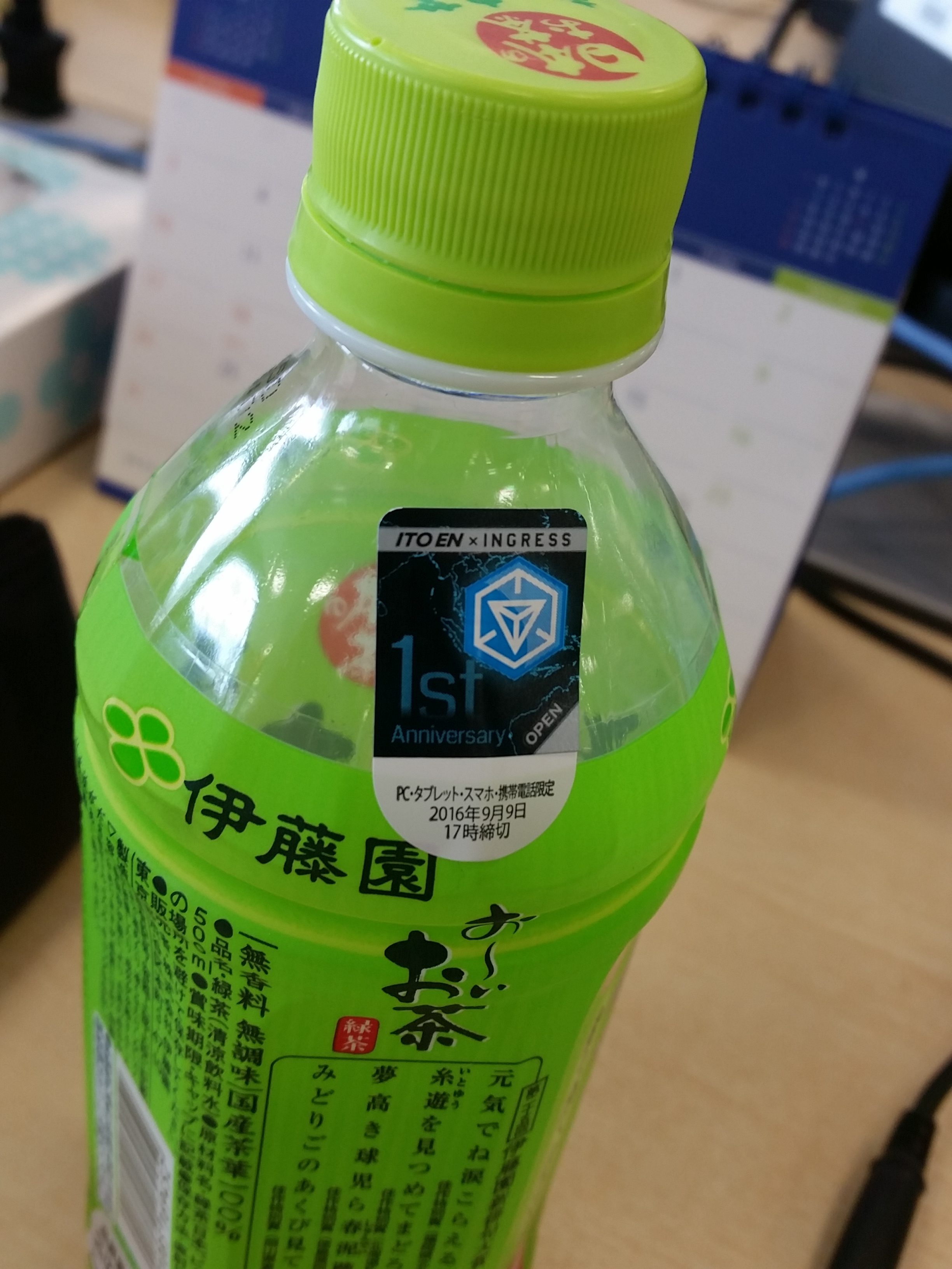 コンビニとかでも買えるのかな？ [1]